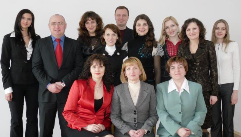 Фото вкладачів кафедри Економіки та безпеки підприємства 2010 рік